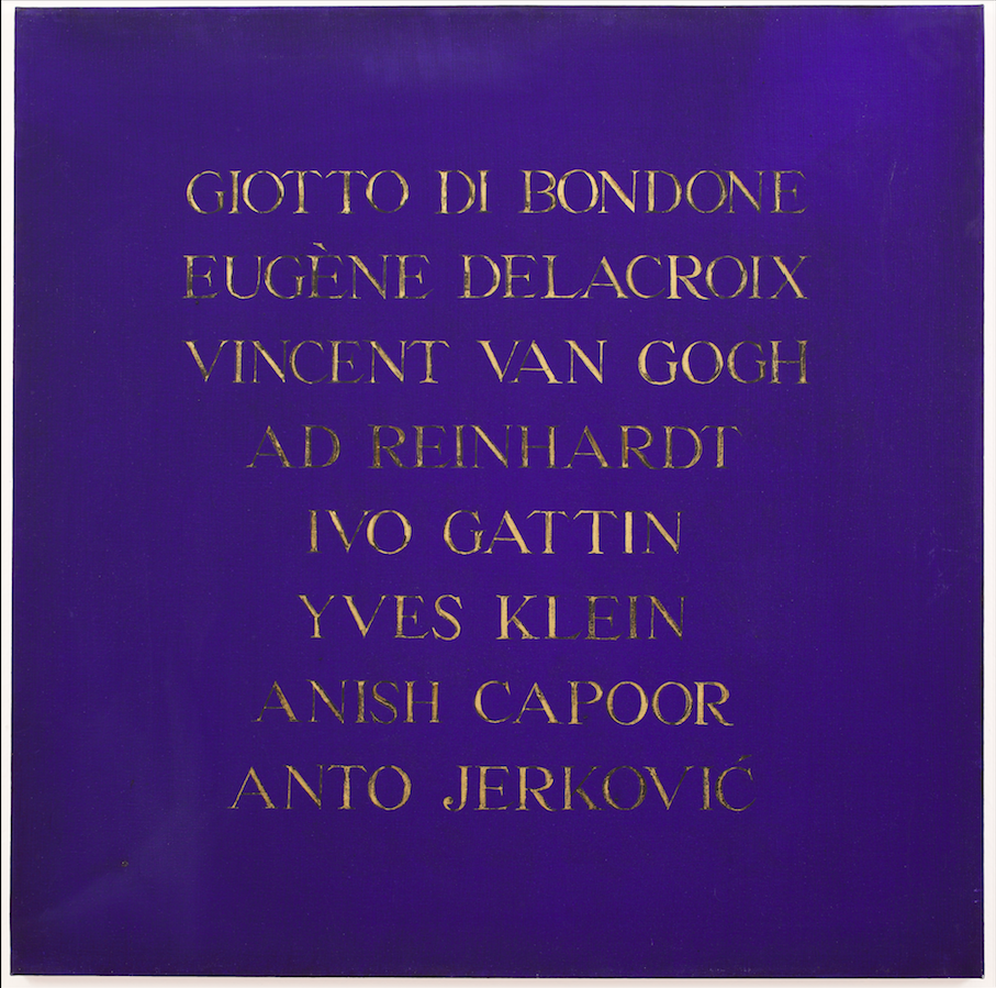 Ulje na platnu "Giotto di Bondone" Ante Jerkovića izrađeno je 1992, a fotografirao ga je Boris Cvjetanović 2009 godine.